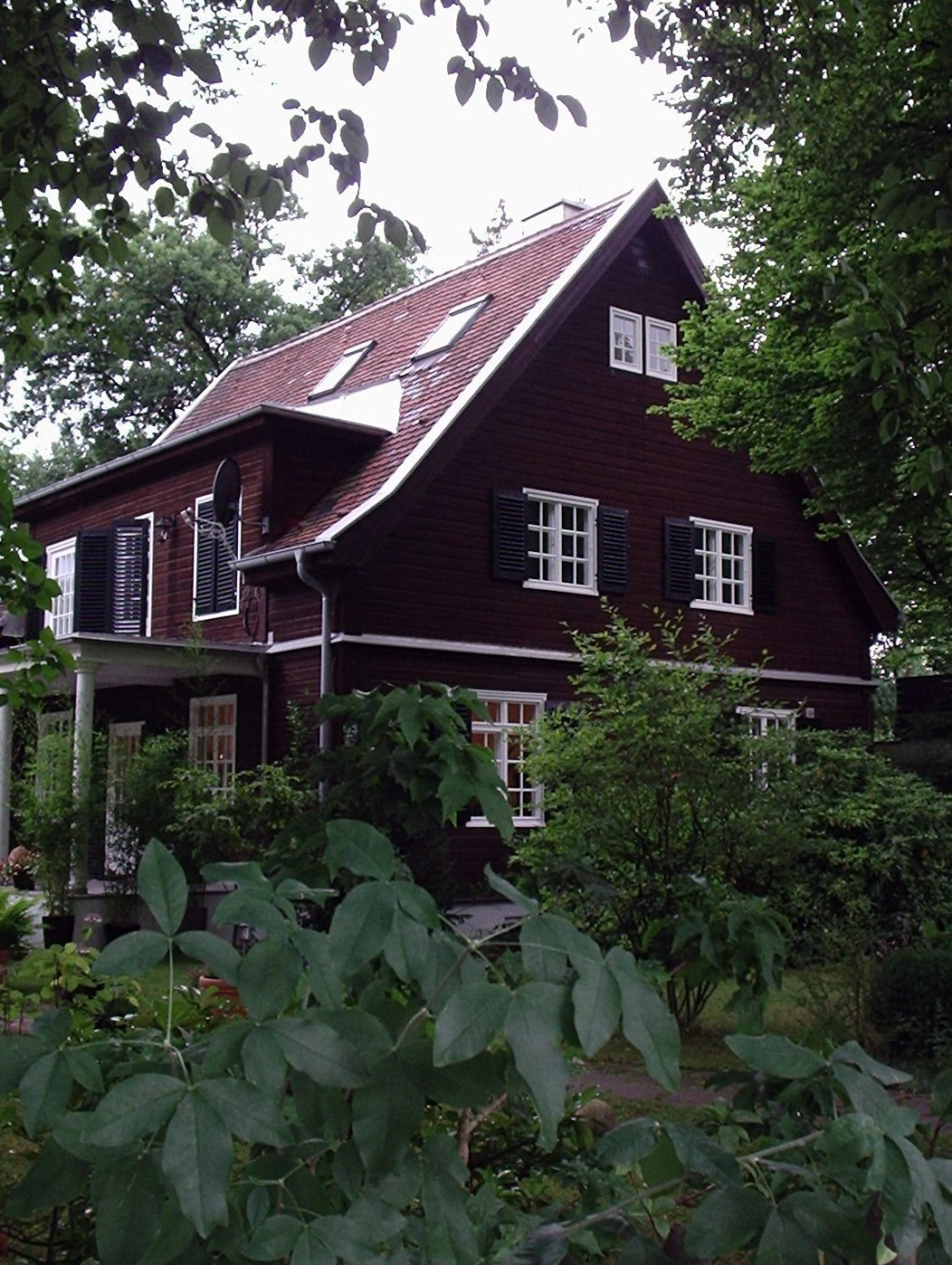 Fachwerkhaus an der Hofbrunnstraße 53 in München-Solln, war 1941–51 Wohnsitz des Schauspielers Beppo Brem